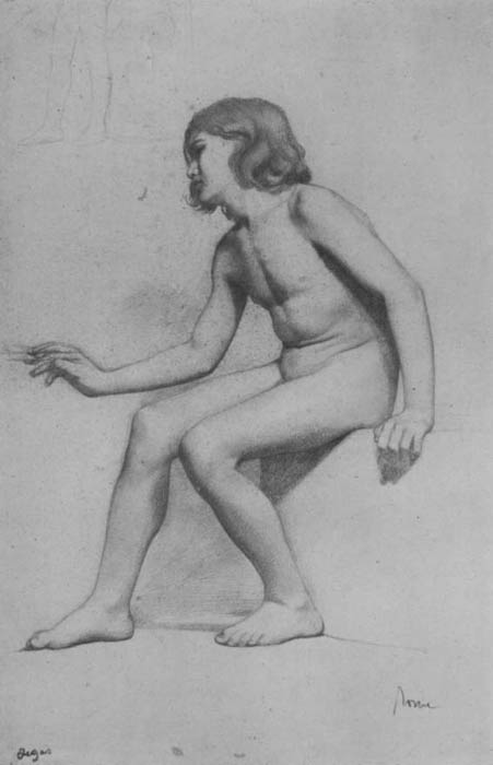 Э. Дега. Сидящий обнаженный мальчик. 1856.